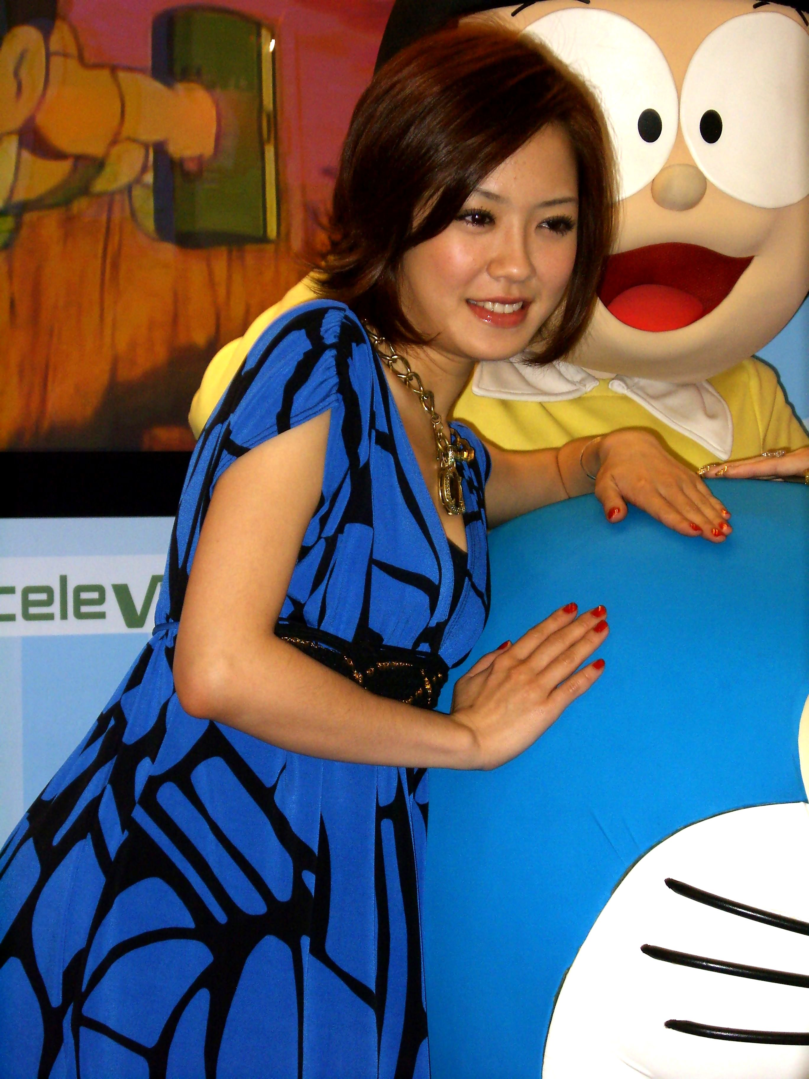 A Taiwanese entertainer Pink Yang at 2007 Taipei TFCOM.